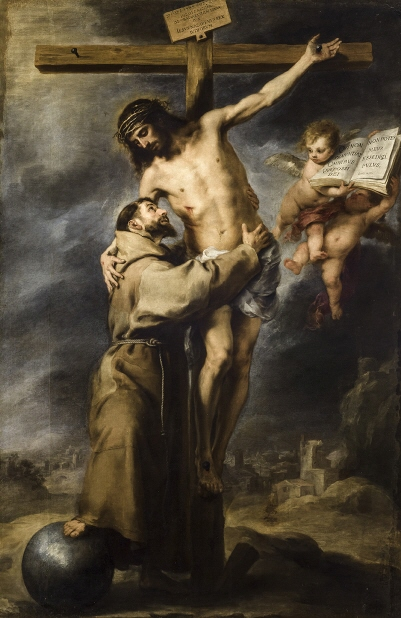 El lienzo representa a San Francisco de Asís abrazando a Cristo crucificado.